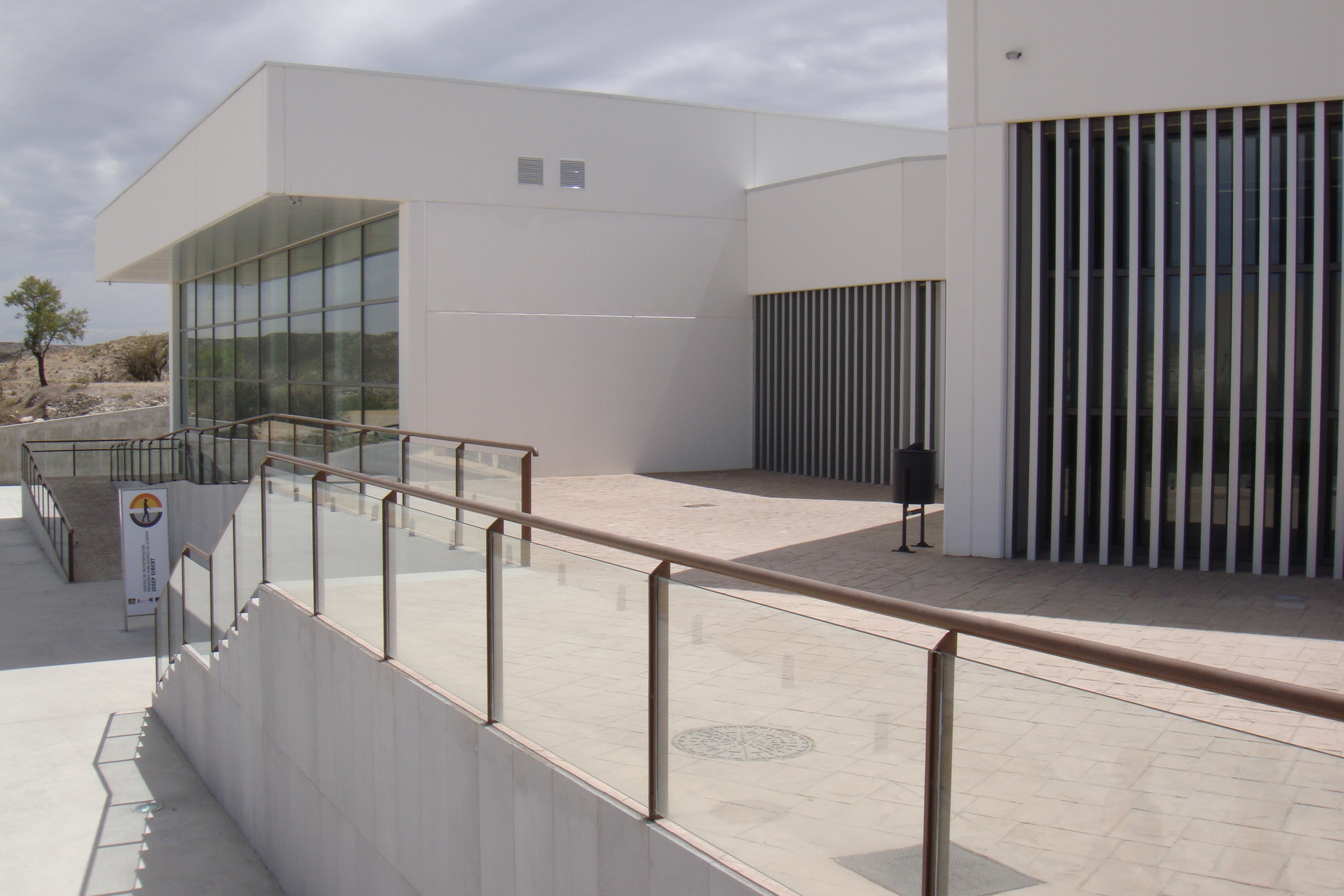 Museo de Prehistoria de Orce, Granada (España)